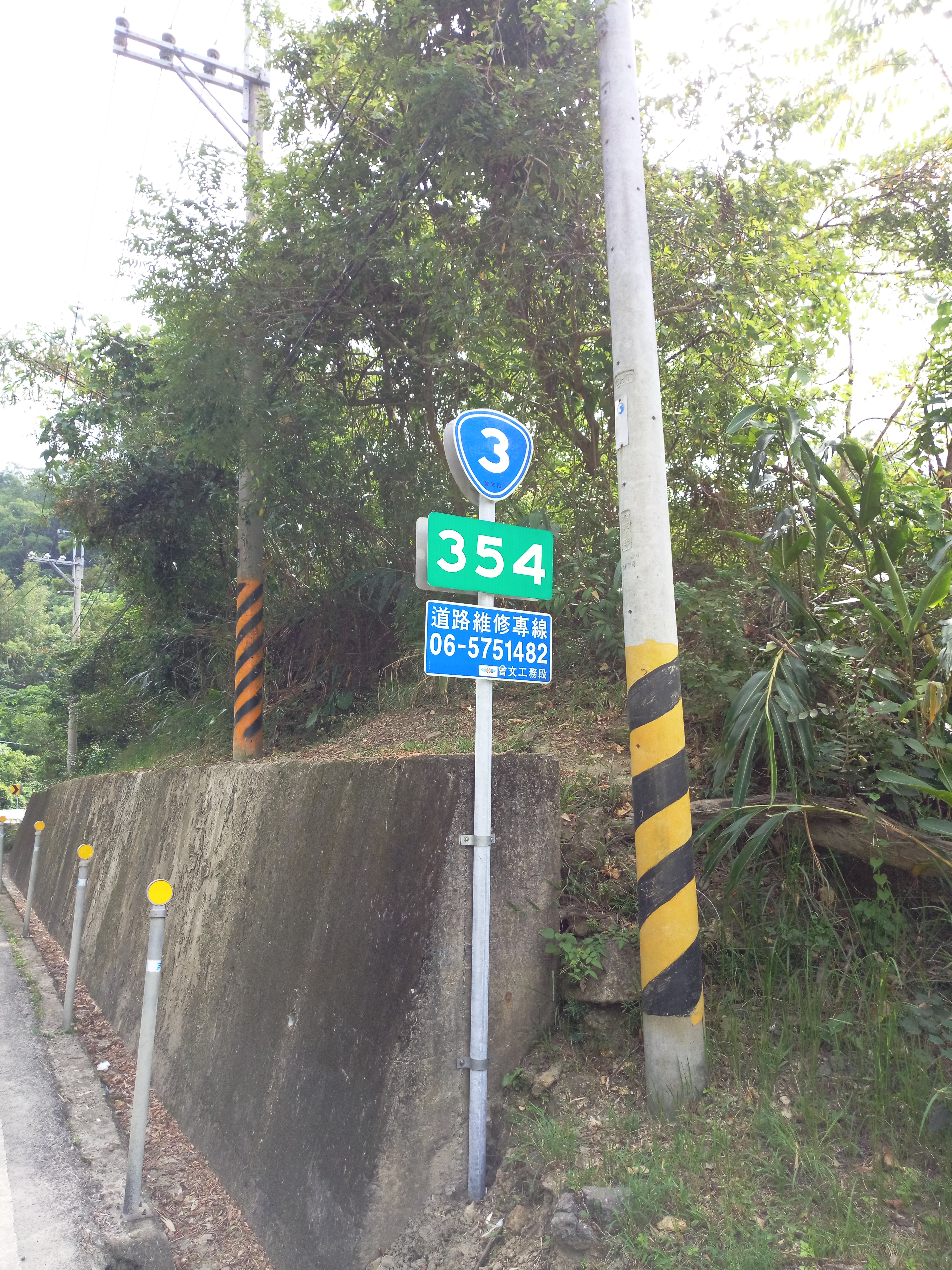 中文（台灣）: 台3線 楠西路段354公里路牌